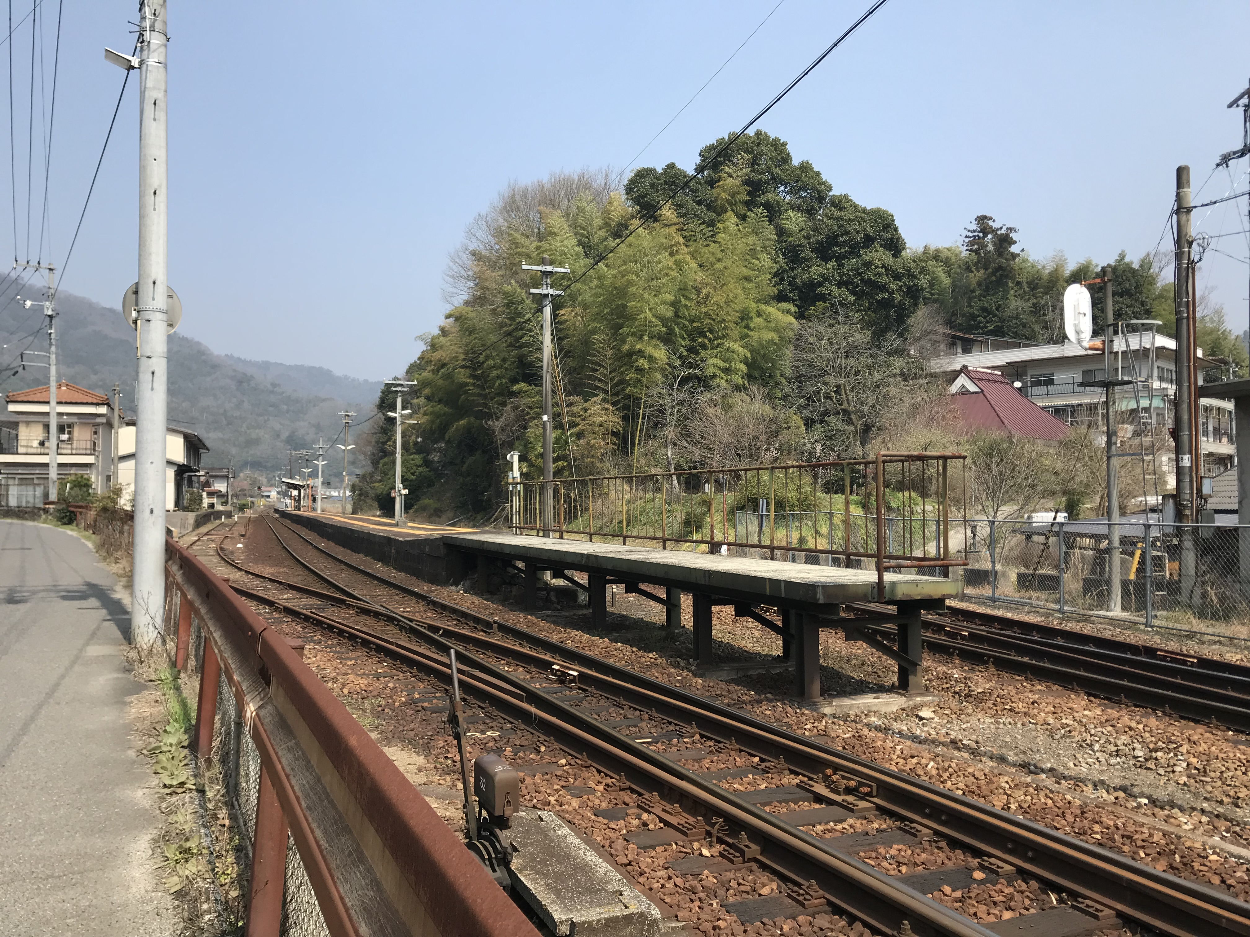 南側より望む志和口駅のホーム